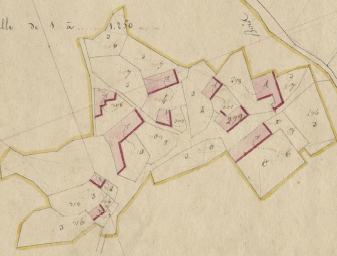 El vilatge de Feners, d'Enveig, en el Cadastre Napoleònic del 1812 (Arxius Departamentals dels Pirineus Orientals)